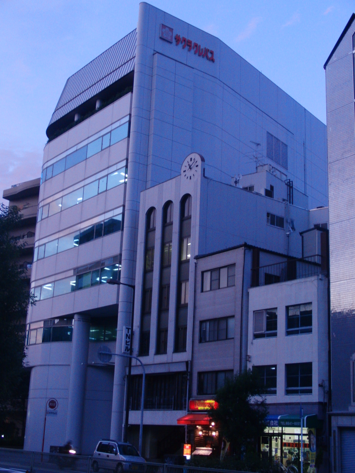 株式会社サクラクレパス本社